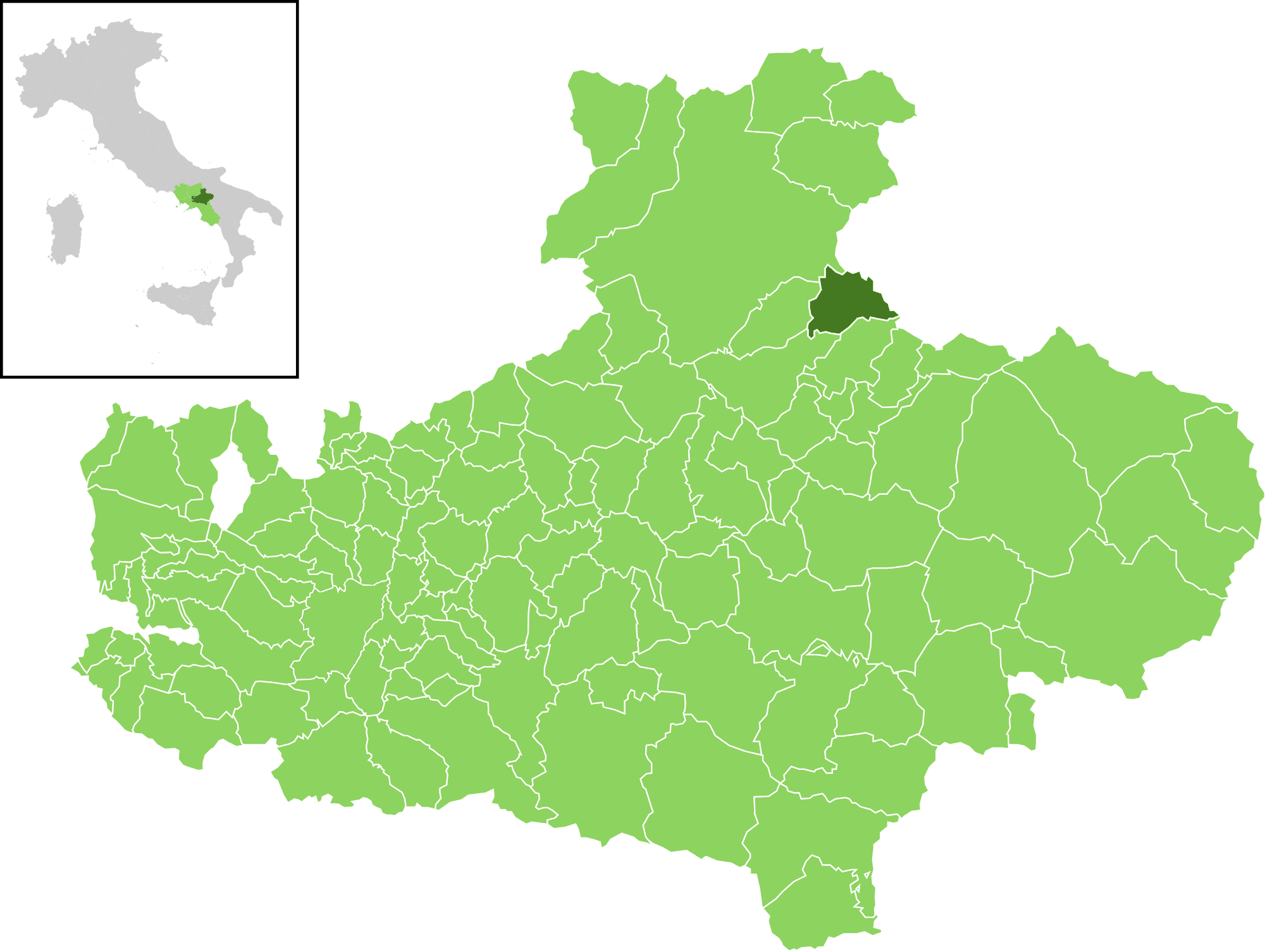 Posizione del comune all'interno della provincia di Avellino